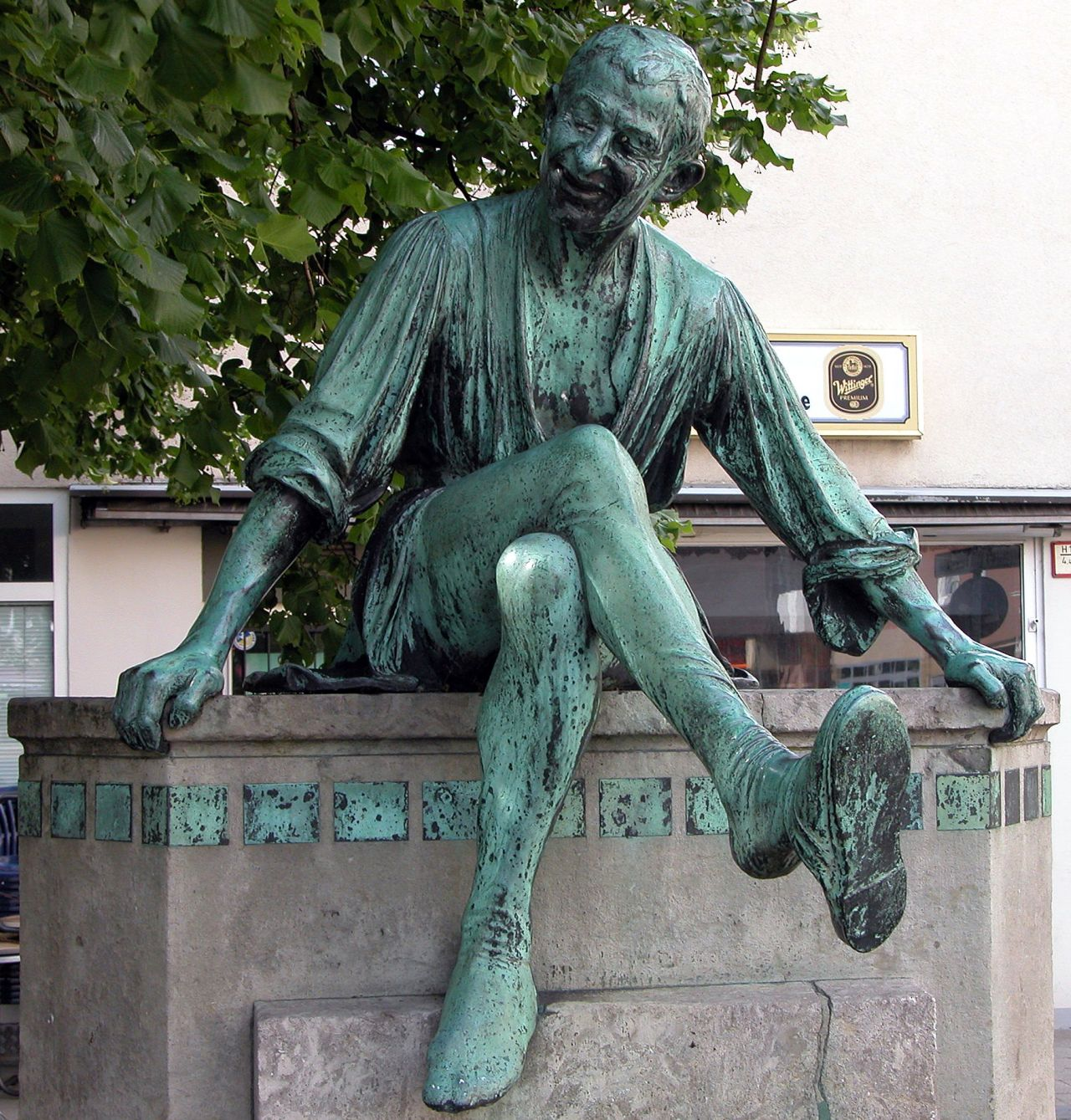 Braunschweig: Detail des Till Eulenspiegel-Brunnens